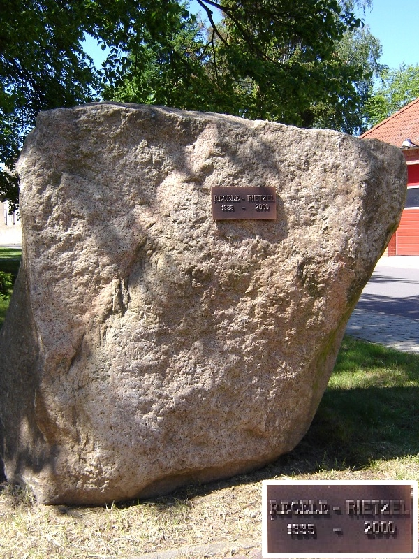 Rietzel, Sachsen-Anhalt, Gedenkstein 1335